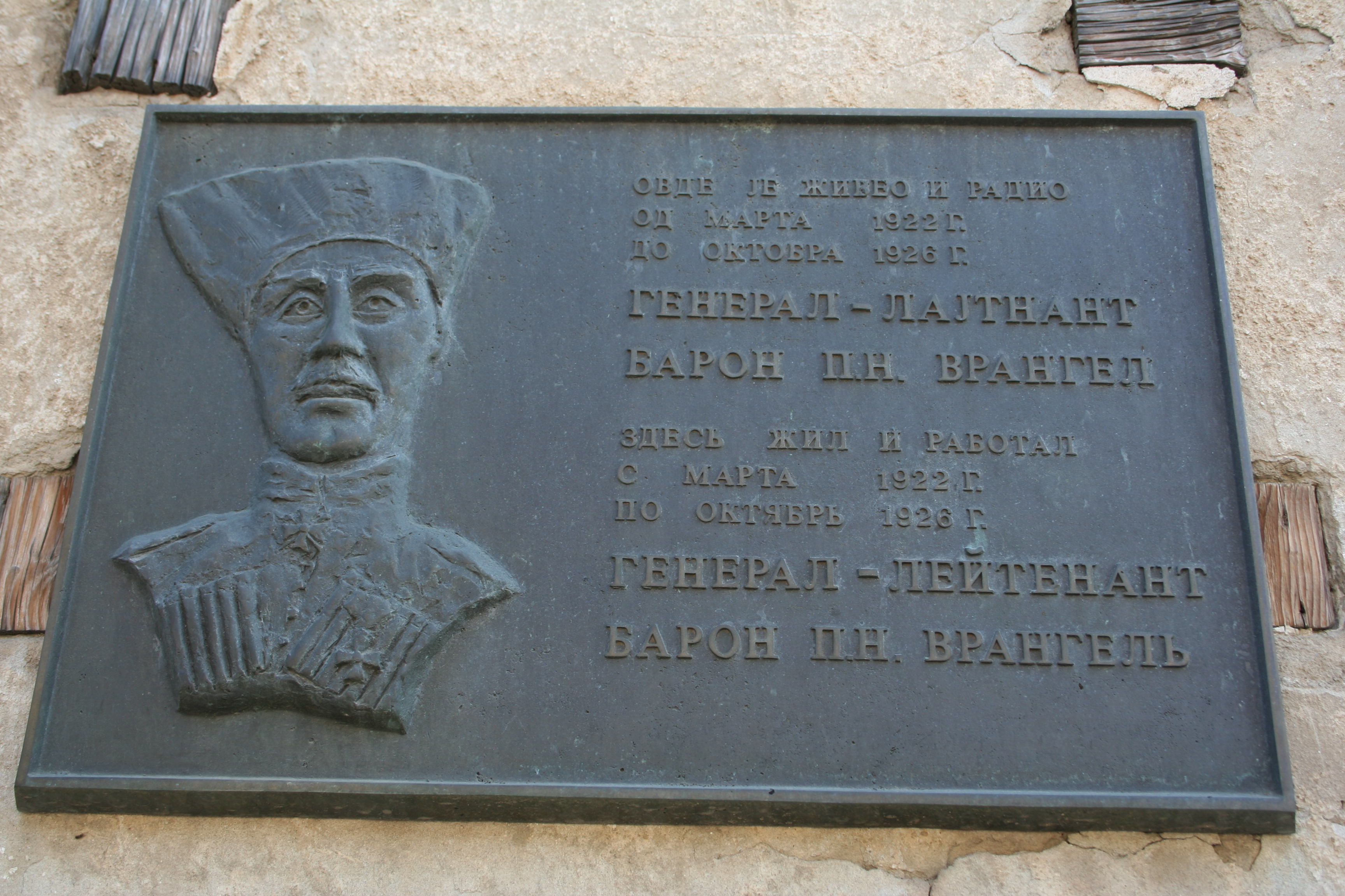 Kuća u kojoj je živeo baron Vrangler